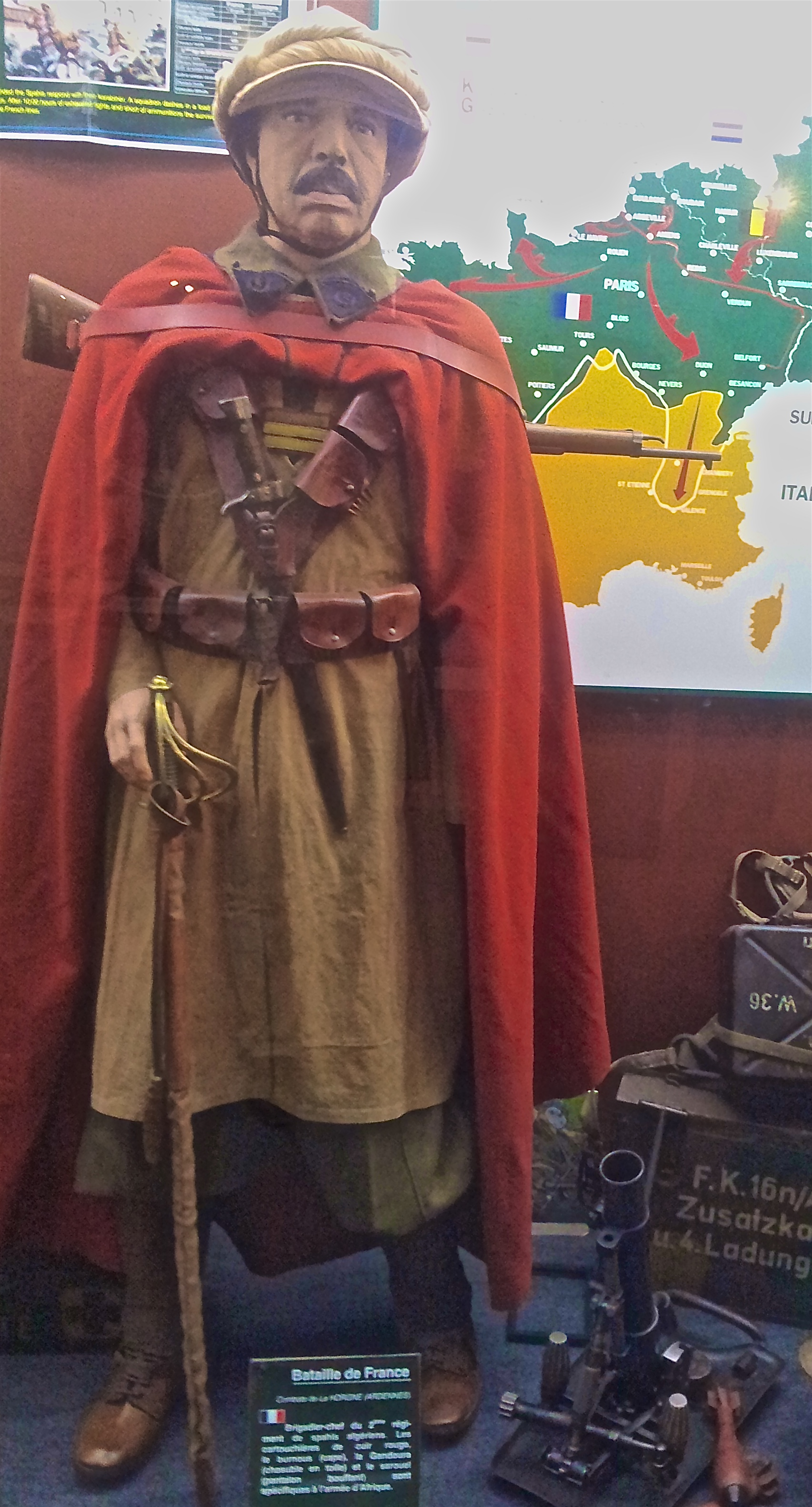 Brigadier-chef du 2e régiment de spahis algériens lors des combats de La Horgne (Ardennes). Mai 1940.Description de l'uniforme : Les cartouchières de cuir rouge, le burnous (cape), la Gandoura (chasuble en toile) et le saroual (pantalon).